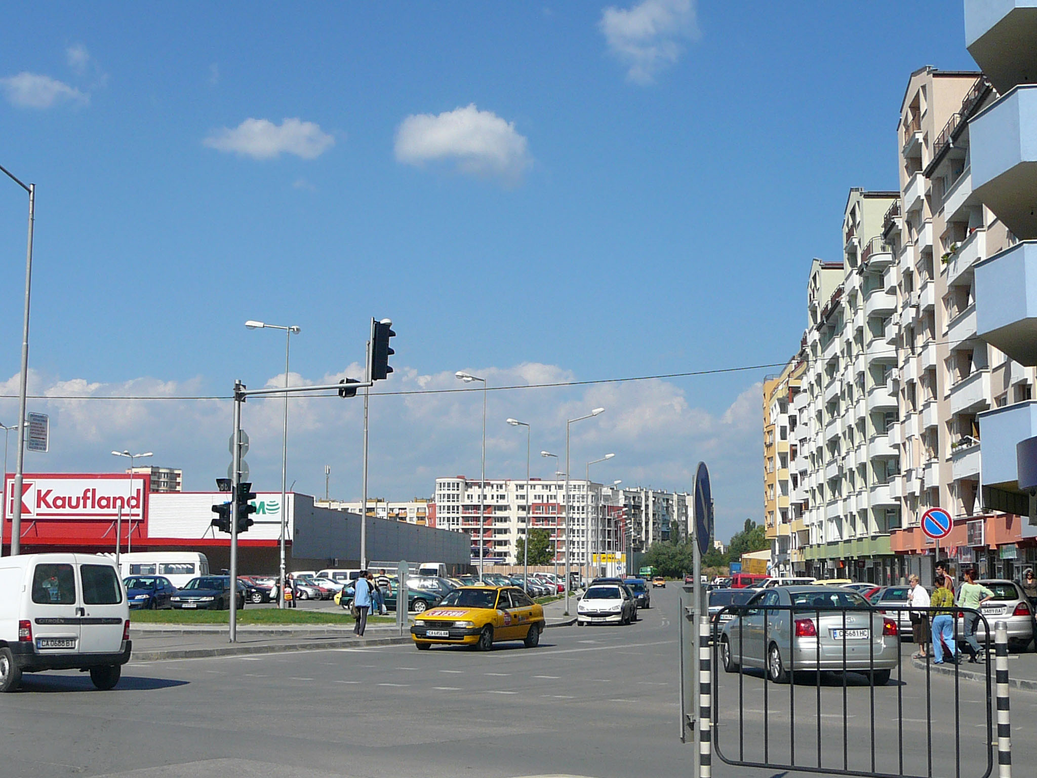 Жилищен комплекс "Младост 3", София